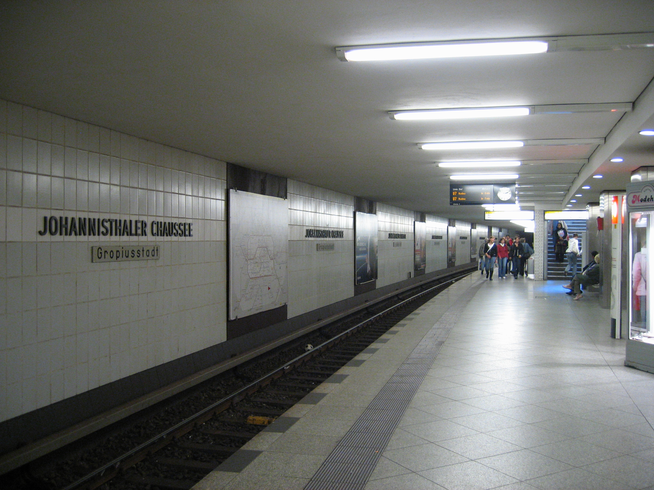 U-Bahnhof Johannisthaler Chaussee, Berlin